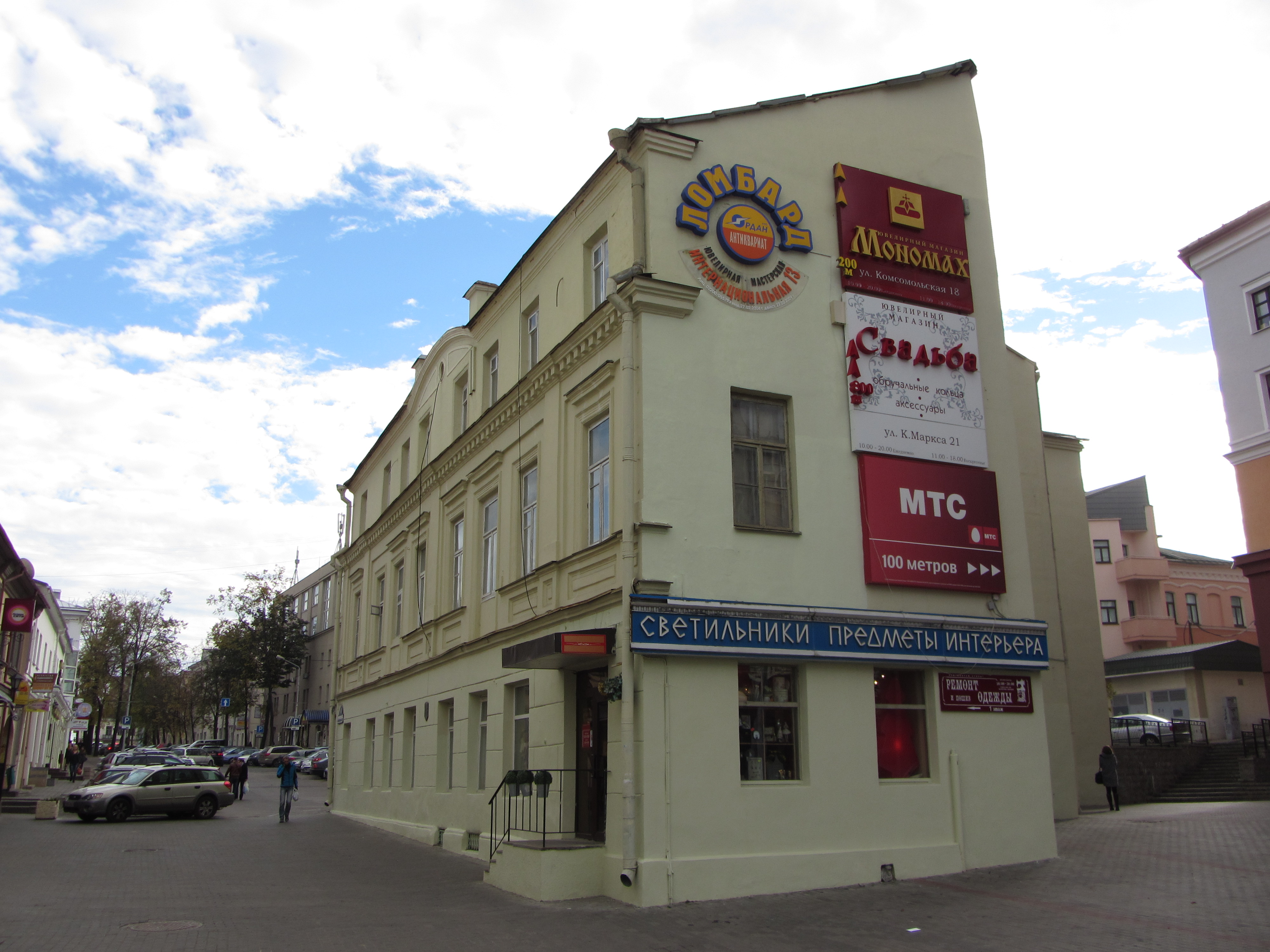 Беларуская (тарашкевіца): Камсамольская 6, Менск